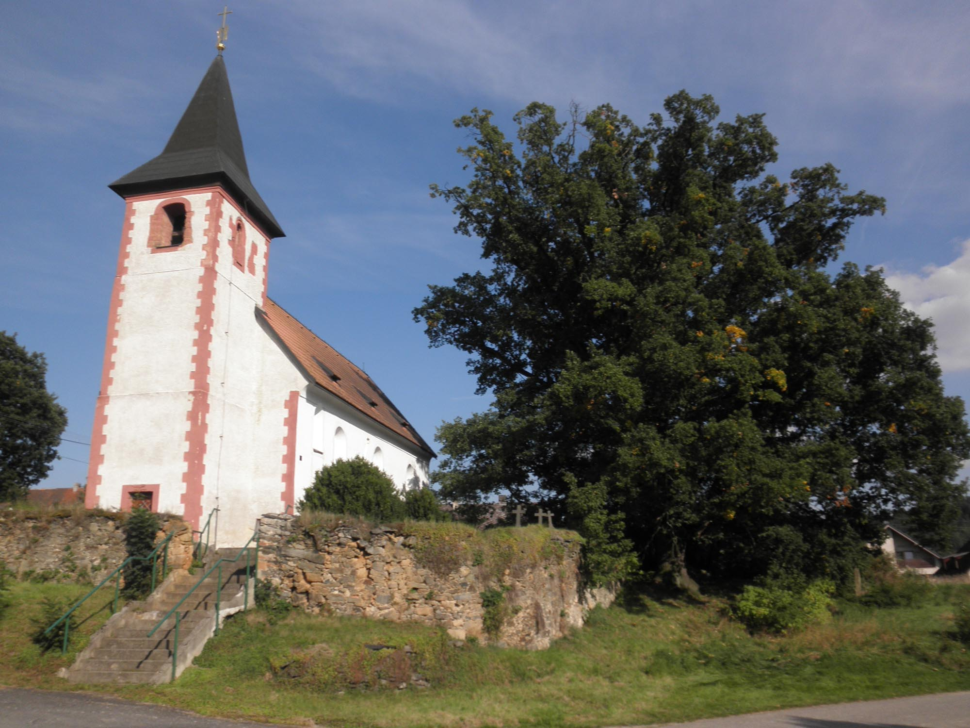 Skviřínský dub